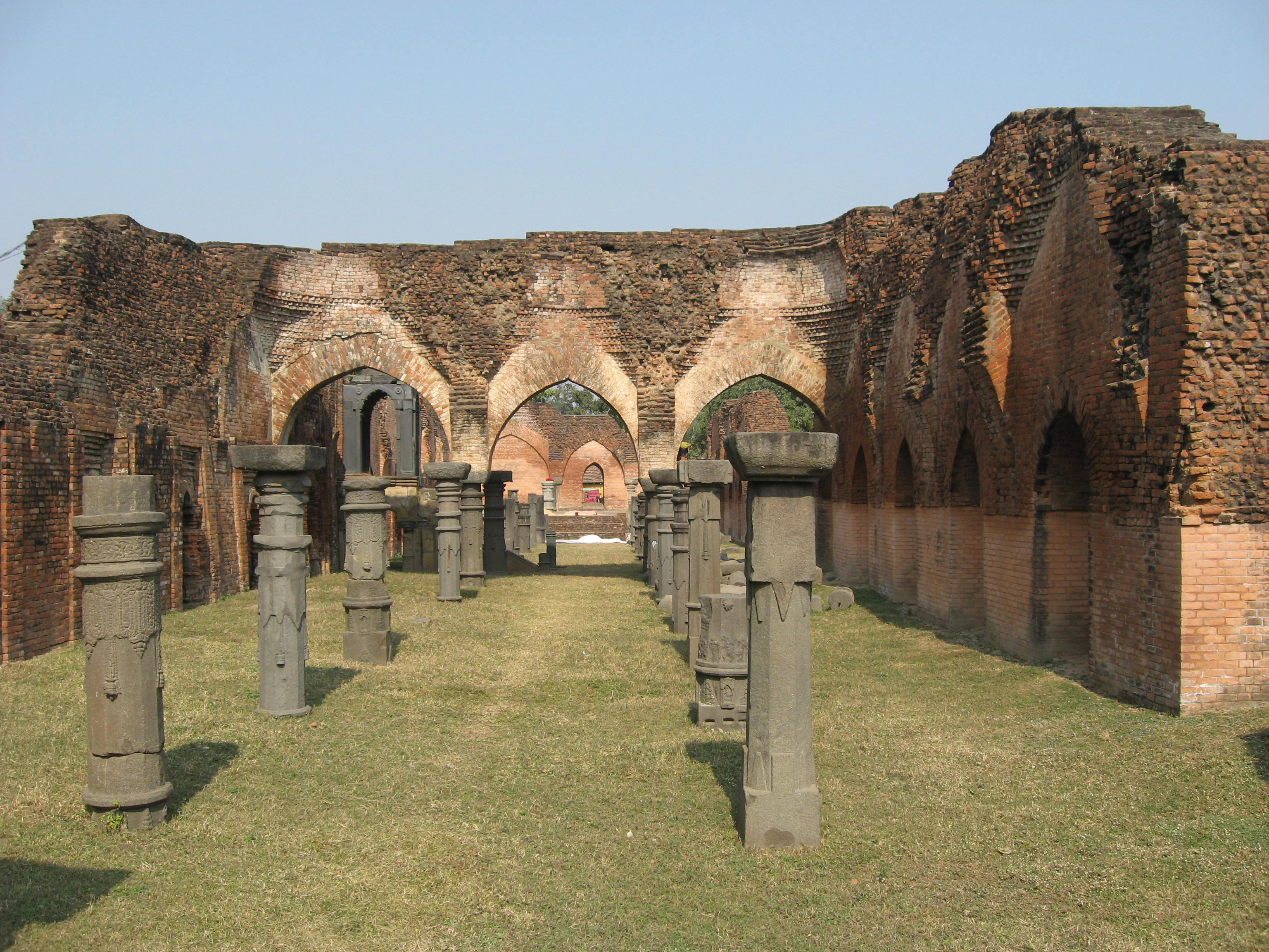 Mosque at Pandua (c. 1300AD) The bari masjid a specimen of the typical brick style of bengal is a long low building, measuring 7041M by 12.80M having three aisles, with 21door openings in front and three on the sides. Its roof has 63 small domes over brick arches resting on stone pillars of hindu design. A canopied platrorm is an attractive feature of the mosque. পাণ্ডুয়ার মসজিদ (আনুমানিক খ্রীষ্টীয় ১৩০০ শতক) বাংলার বিশিষ্ট ইষ্টকশৈলীর নিদর্শন বড়ী মসজিদ ৭০.৪১ মিটার দীর্ঘ এবং ১২.৮০ মিটার প্রস্থ বিশিষ্ট একটি দীর্ঘ নীচু ইমারত যাতে তিনটি বারান্দা এবং সামনে ২১টি ও পাশে ৩ টি দরজা আছে । এর ছাদে হিন্দু নকশাযুক্ত পাথরের স্তম্ভের উপরে ইষ্টকনির্মিত খিলানের ৬৩টি গম্বুজ আছে । ছত্রশোভিত বেদী এই মসজিদটির একটি আকর্ষনীয় অঙ্গ ।